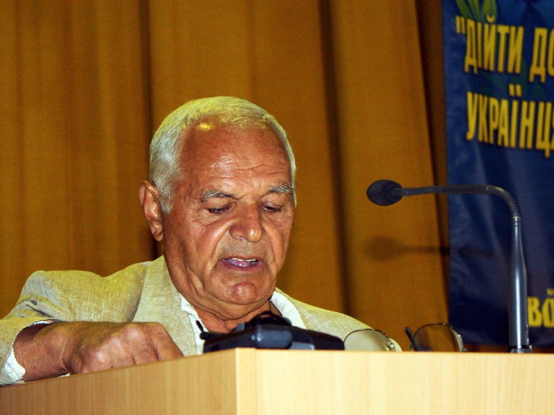 Юрій Герасимович Іллєнко на ХХ з'їзді ВО «Свобода».